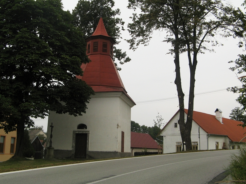 Kaple Nejsvětější Trojice, Nová Olešná.